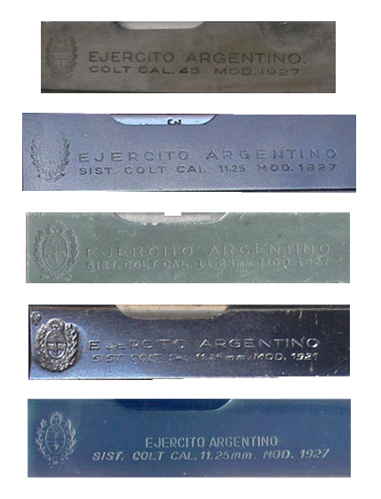 Evolucion de los marcajes de las pistolas sistema Colt del ejercito Argentino